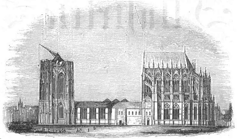 Ansicht des Kölner Doms in der Gegenwart.